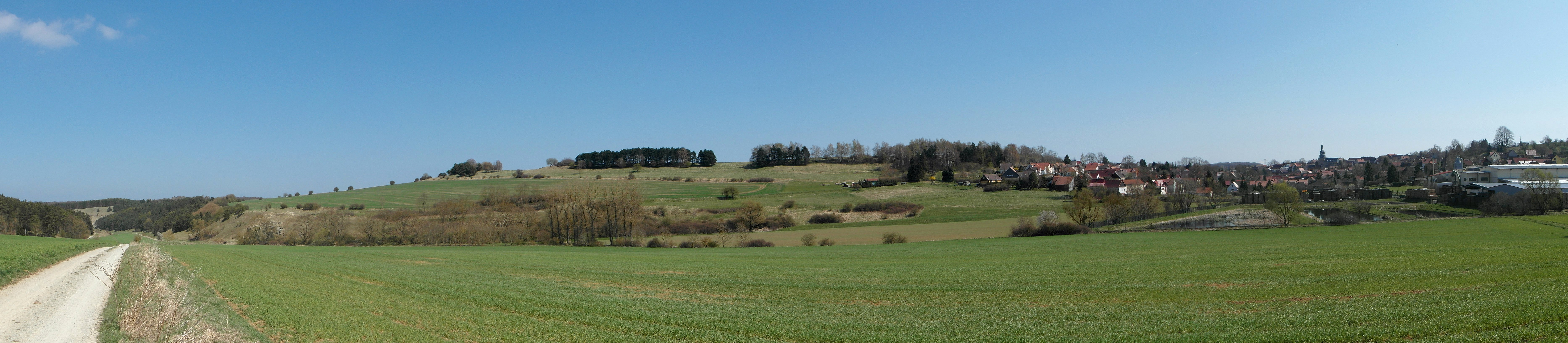 Das Helbetal (li) nördlich Holzthaleben mit Blick auf Holzthaleben (re) und den Feldberg (Mitte) auf dem Dün